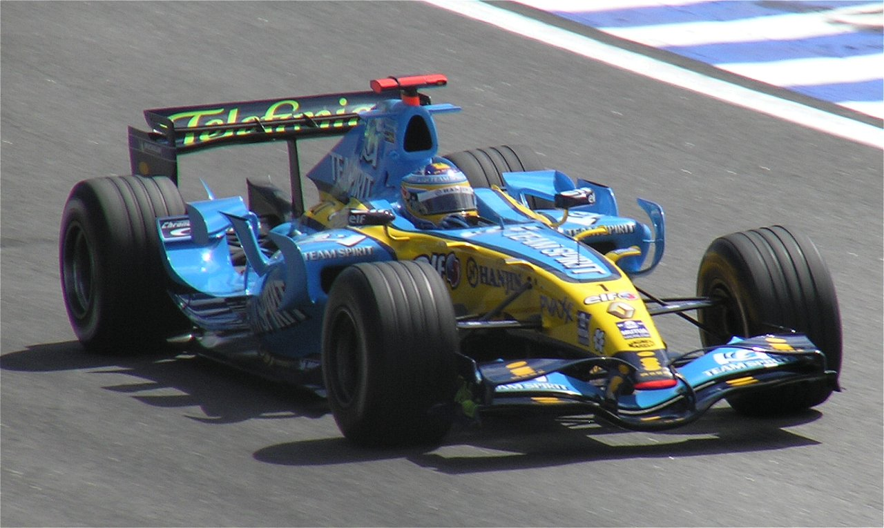 Formula One 2006 Rd.18 Interlagos: #1 Fernando Alonso (Renault)